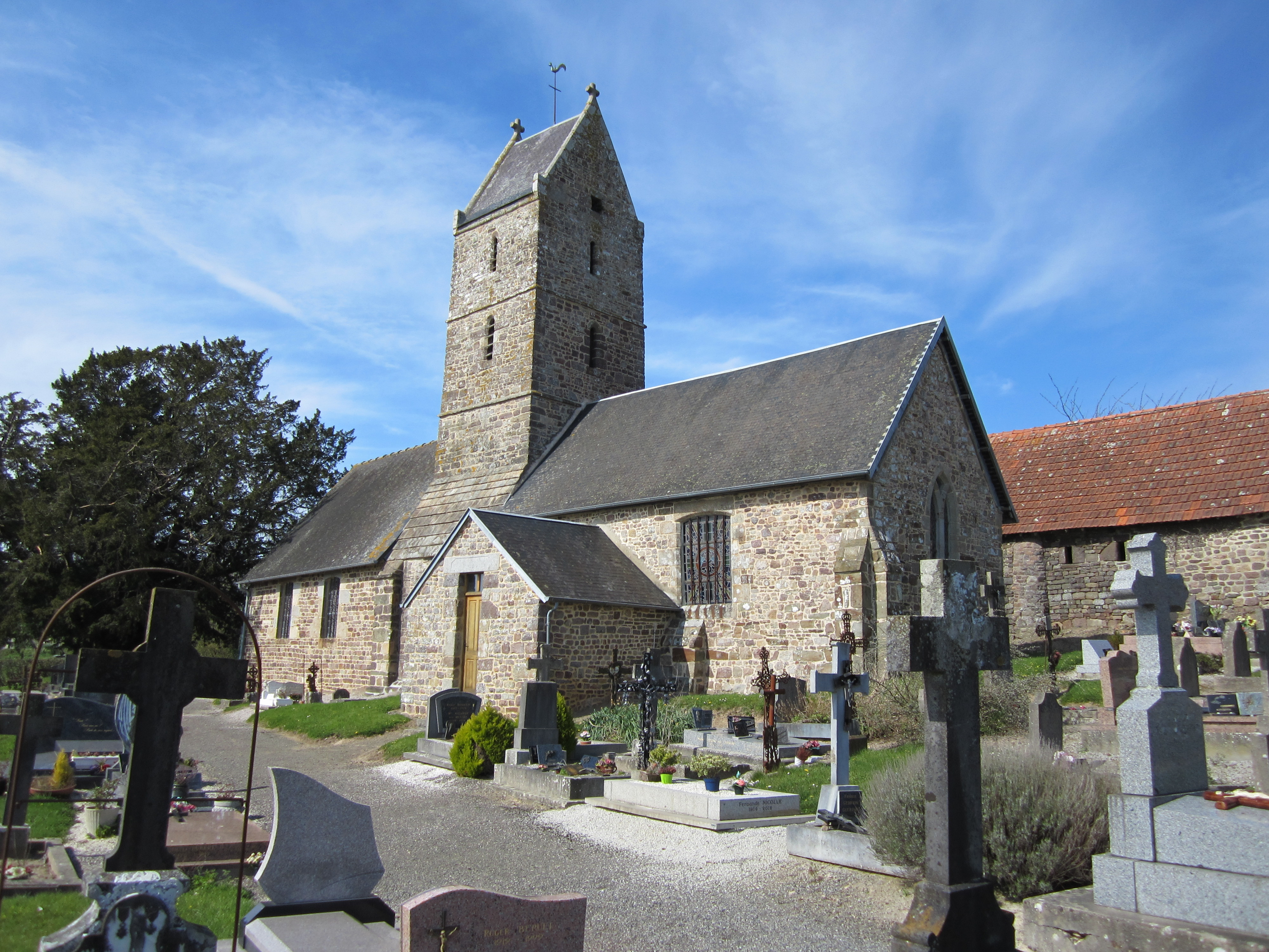 église Saint-Léger, Manche .